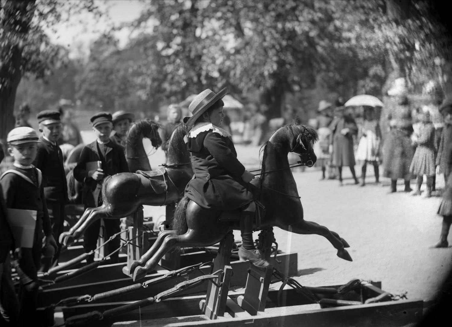 Depicted person: Knut Nilson, Sverige (1883-1953); Eberstein, Knut (tog som vuxen sin mors släktnamn) depicted place: Stockholm, Humlegården (Sverige (SE))